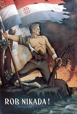 Promidžbeni plakat NDH "Rob nikada!"